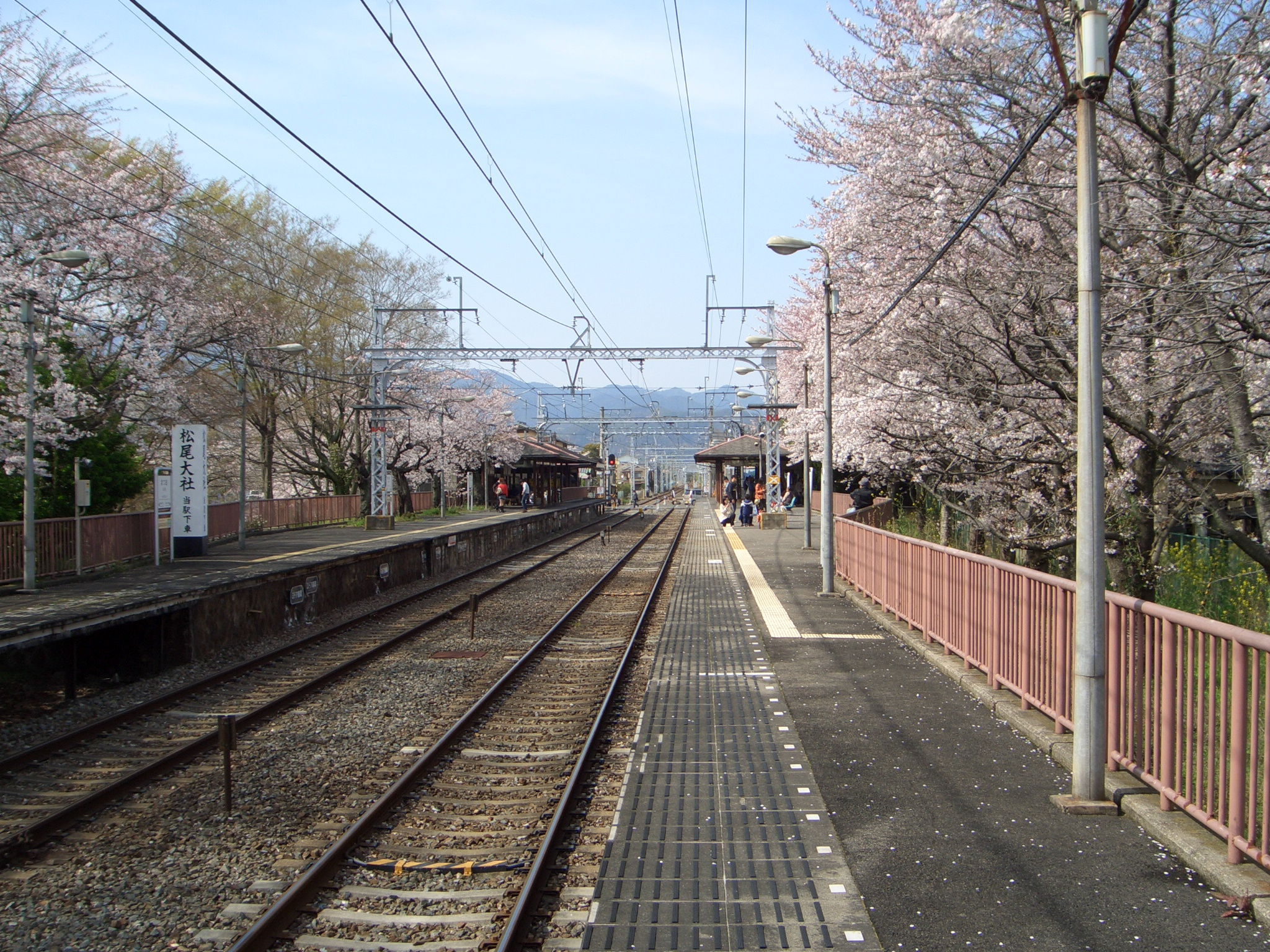 阪急電鉄嵐山線松尾駅構内。京都市西京区。 桂方面のりば南端より北北西を望む。